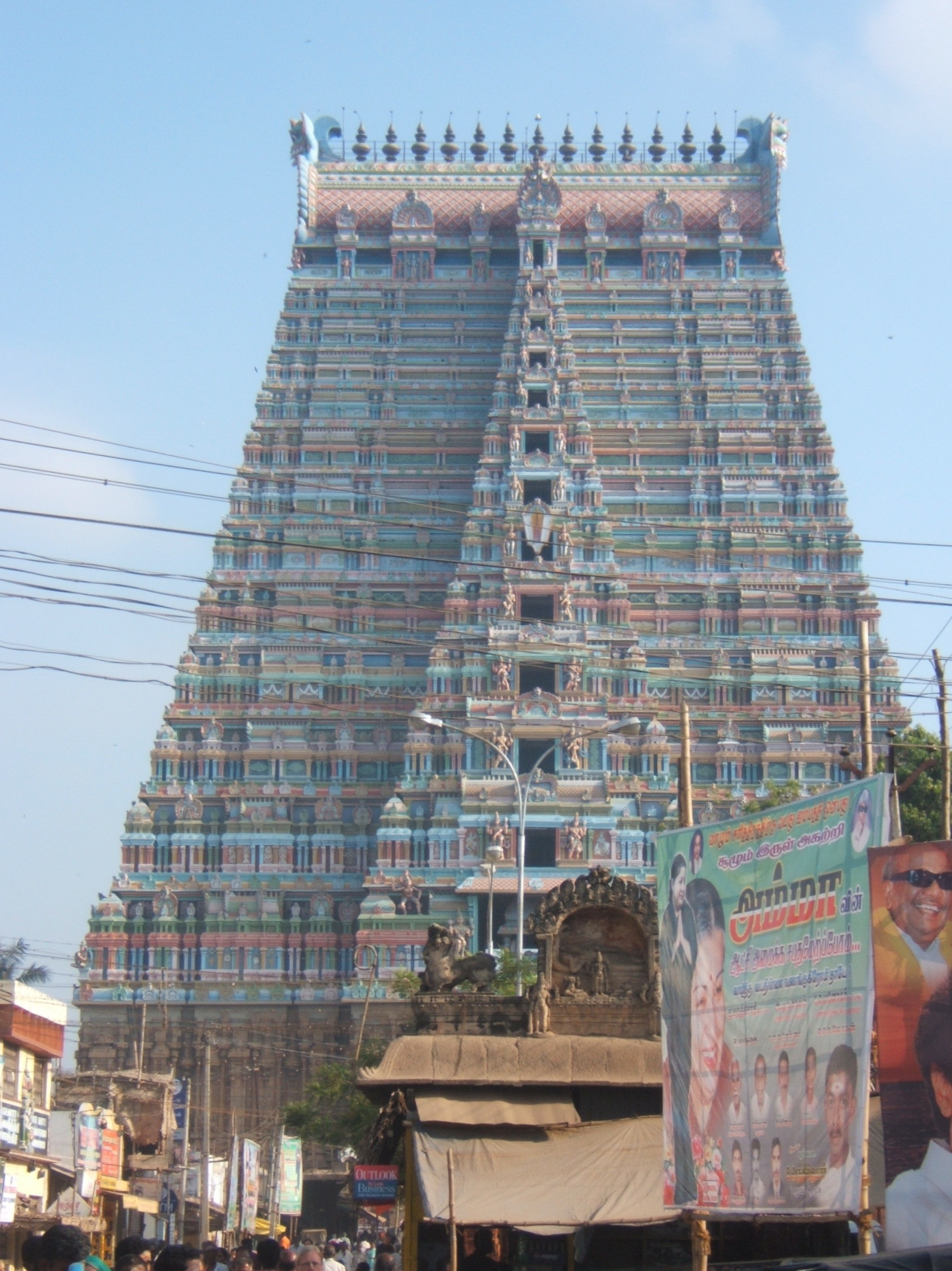 Srirangam temple main gopuram Tamil Nadu India